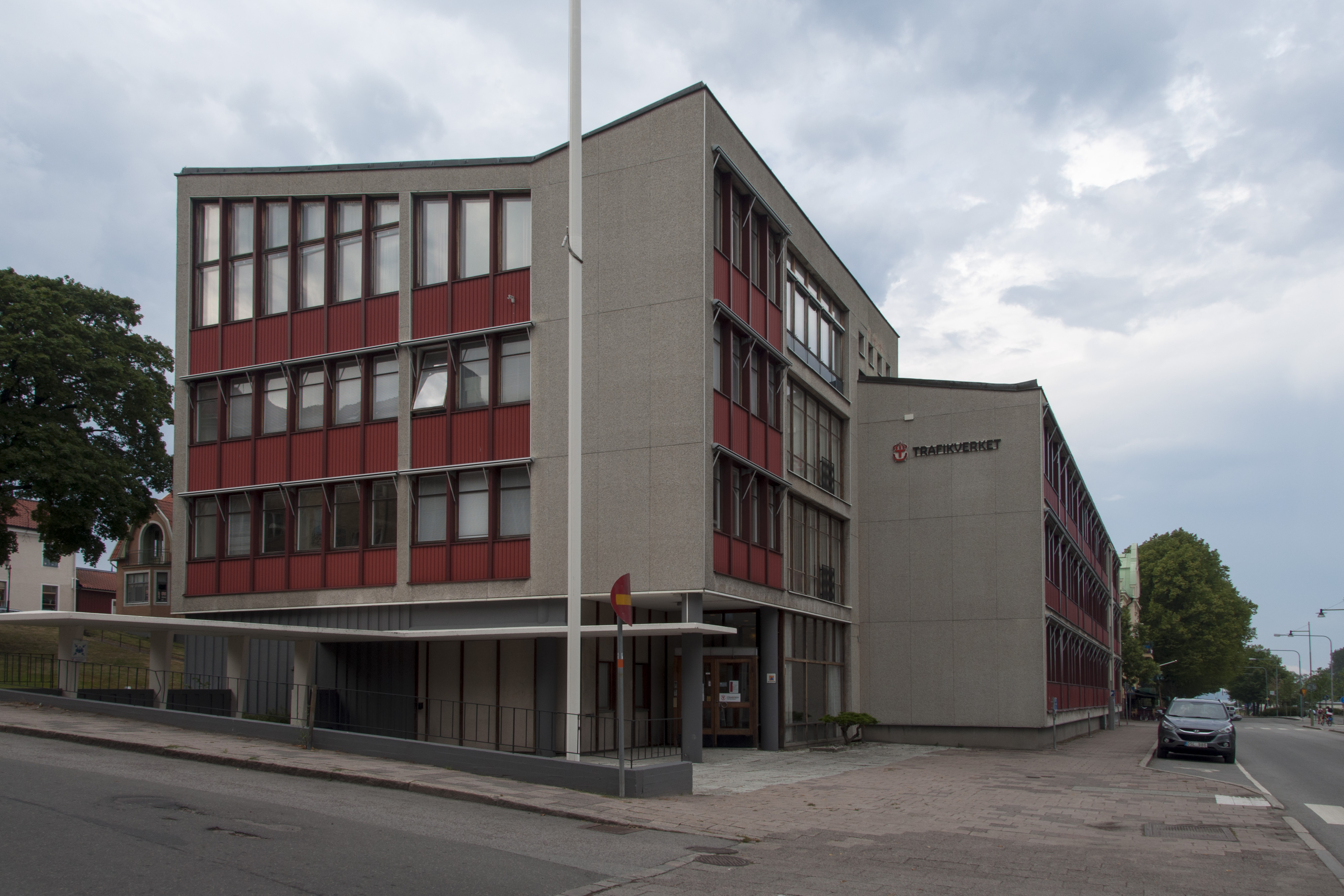 Gamla stadshuset i Mariestad, kv. Vargen 6. Byggnadsår 1962. Arkitekt Per Lagergren. Ursprungligen fasader i delputs som 1977 klätts med asbetscementskior och plåt